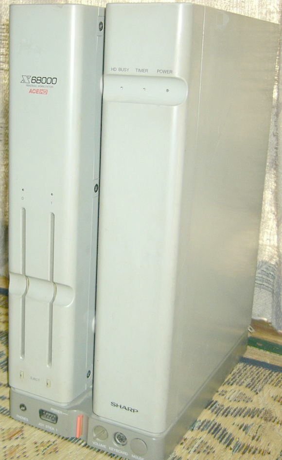 SHARP X68000ACE-HD。1988年発売。撮影者は1989年に購入。現在も動作する。